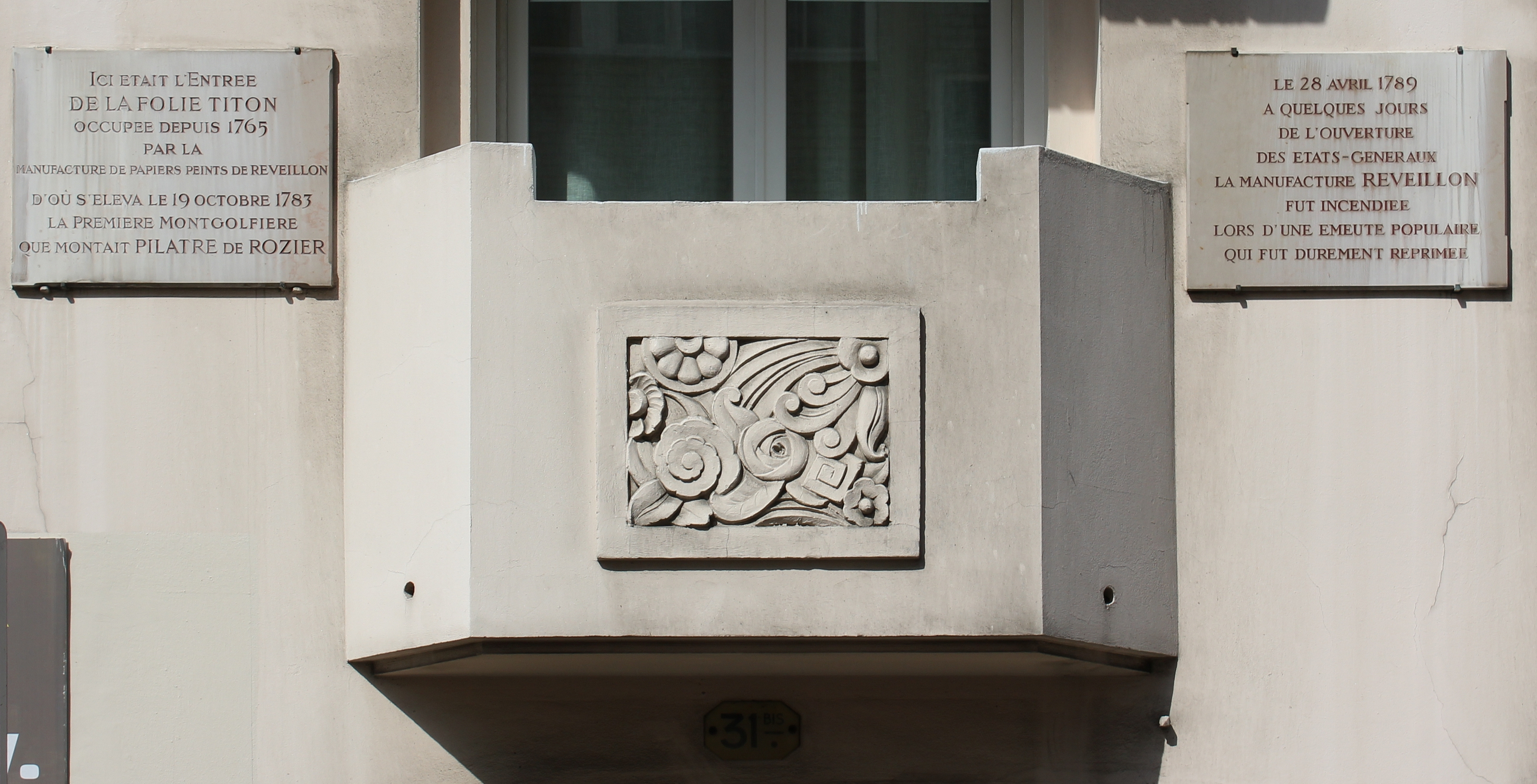 Plaques sur la maison au 31 bis rue de Montreuil dans le Faubourg Saint Antoine à Paris où se trouvait la Folie Titon, fabrique de papier peints, d'où décolla la première montgolfière le 19 octobre 1783 et où commencèrent les émeutes de Paris des 26, 27 et 28 avril 1789 qui amenèrent à la révolution française.